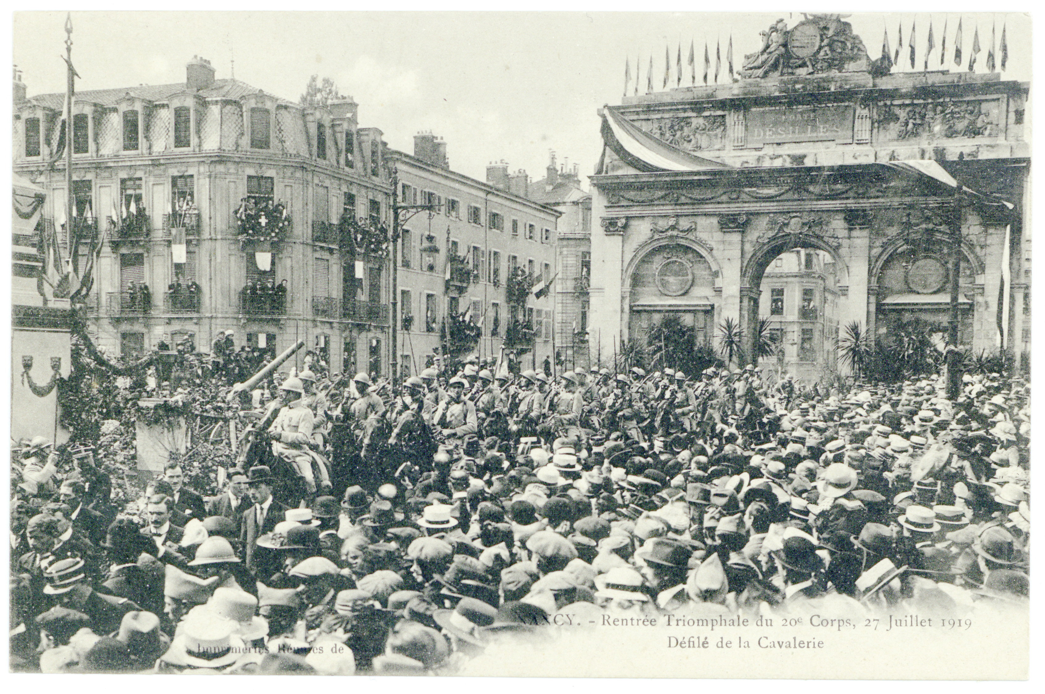 Papier vert au verso